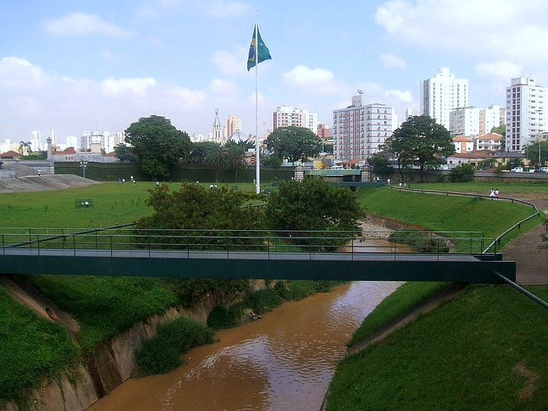 Riacho do Ipiranga, na altura do sítio histórico em que foi proclamada a Independência do Brasil, no Parque Independência, em São Paulo.